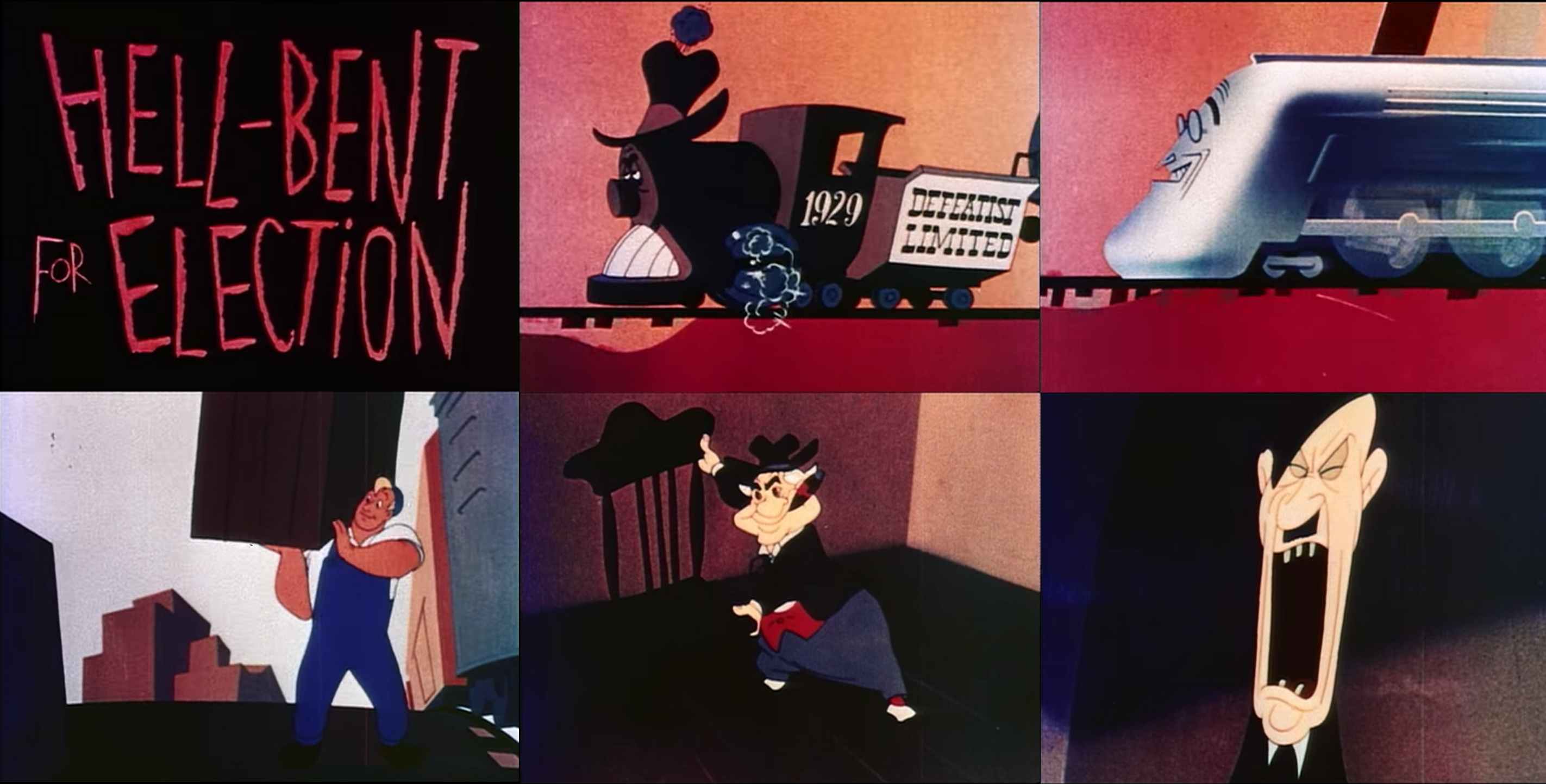 Significant fragments of the movie Hell Bent for Election, corresponding to the election campaign of Franklin D. Roosevelt in the 1944 elections.